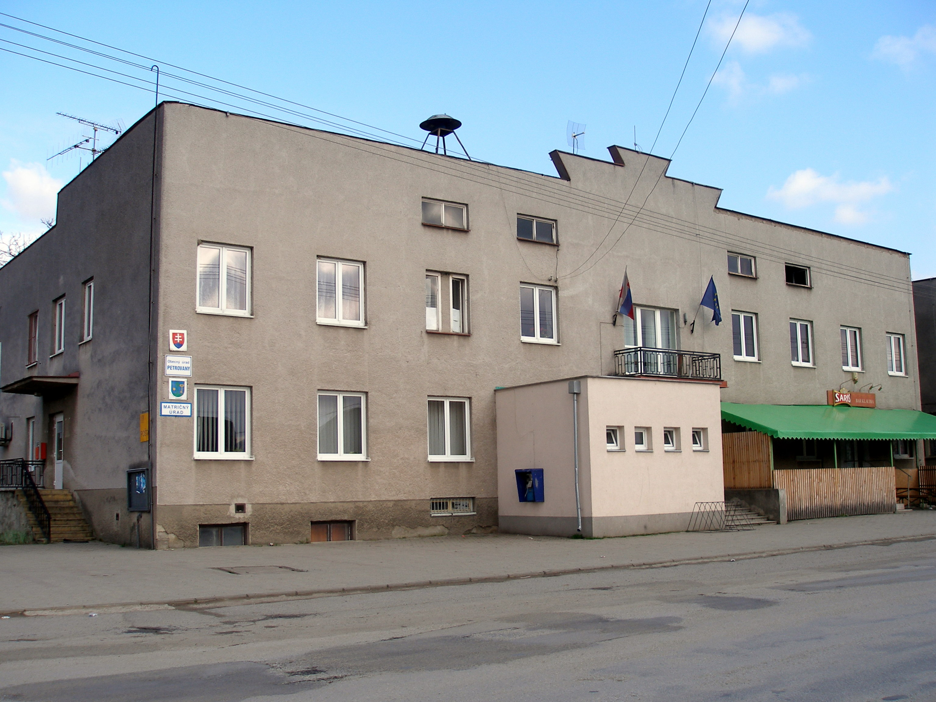 Obec Petrovany okres Prešov región Šariš